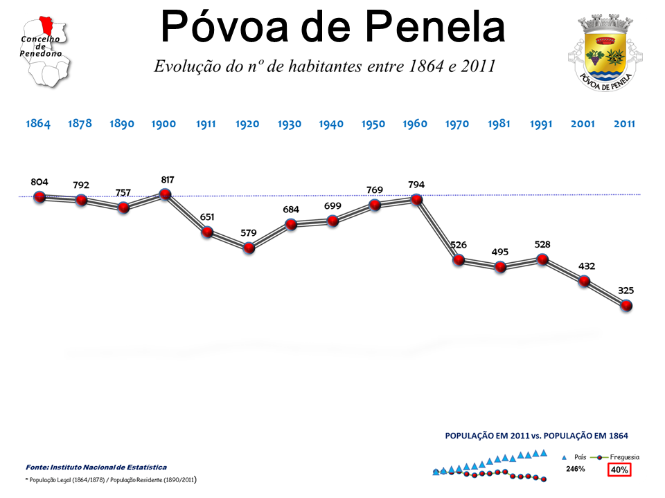 Mapa das freguesias